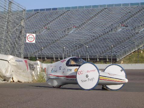 Ecorunner